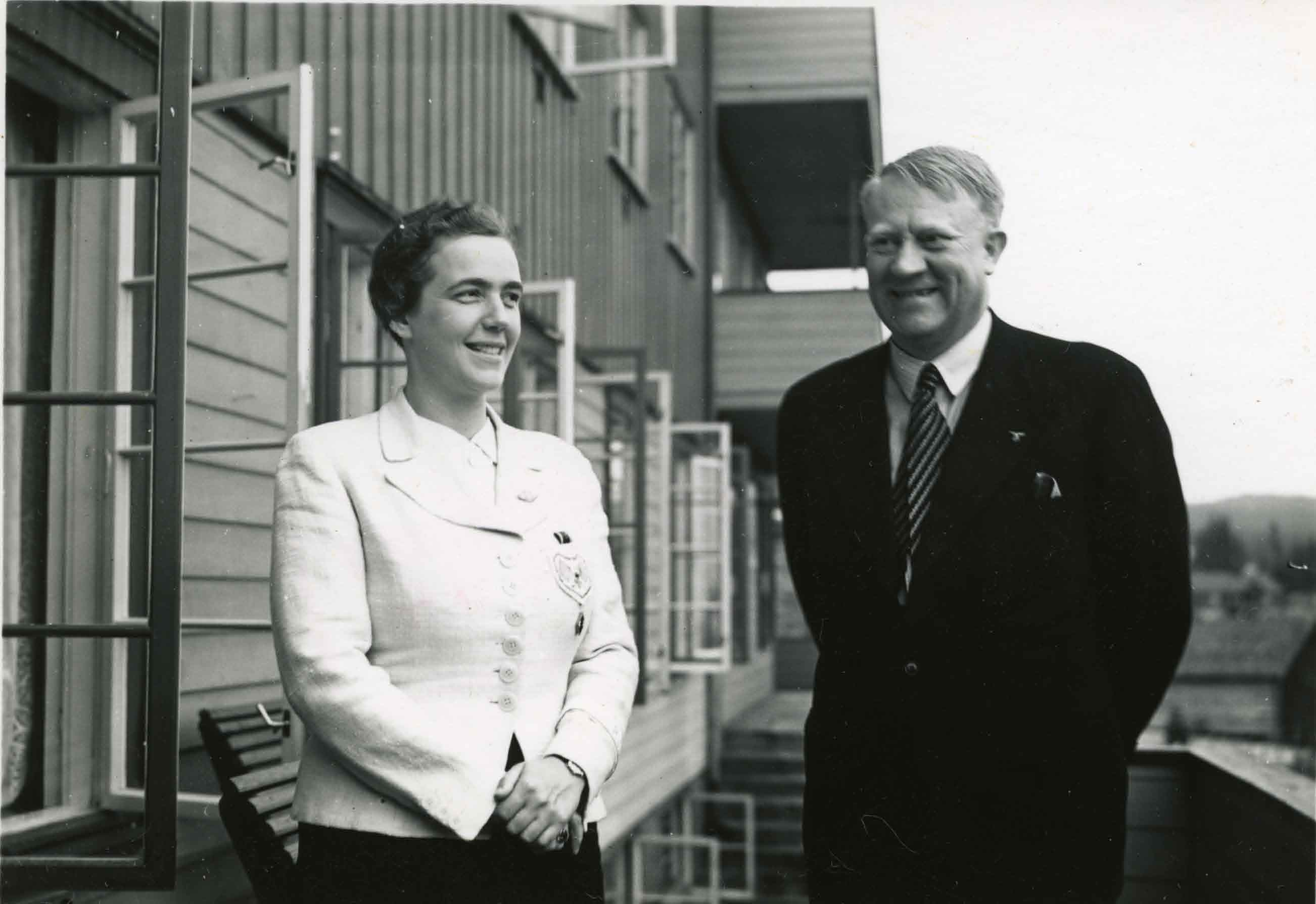 Fotograf: Presse- og propagandaav. Billed- og filmktr. RA/PA-0781/Fa/0001/0107 1152 Nasjonal Samling, forkortet NS, var et norsk politisk parti som ble grunnlagt av Vidkun Quisling i 1933 og ble oppløst ved frigjøringa i 1945. Ideologisk fulgte partiet den tyske nasjonalsosialismen, og NS ble støtteorganisasjon for den tyske okkupasjonsmakta i Norge under andre verdenskrig.